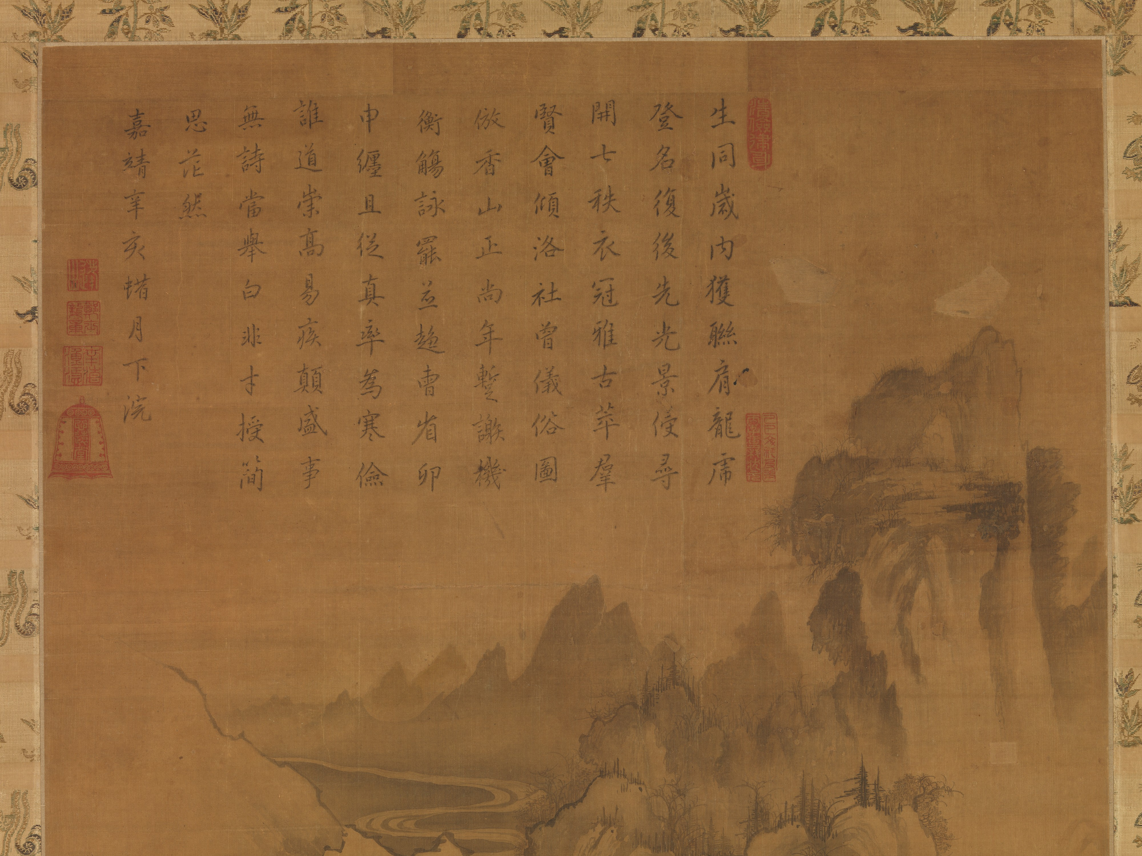 Korea; Hanging scroll; Paintings